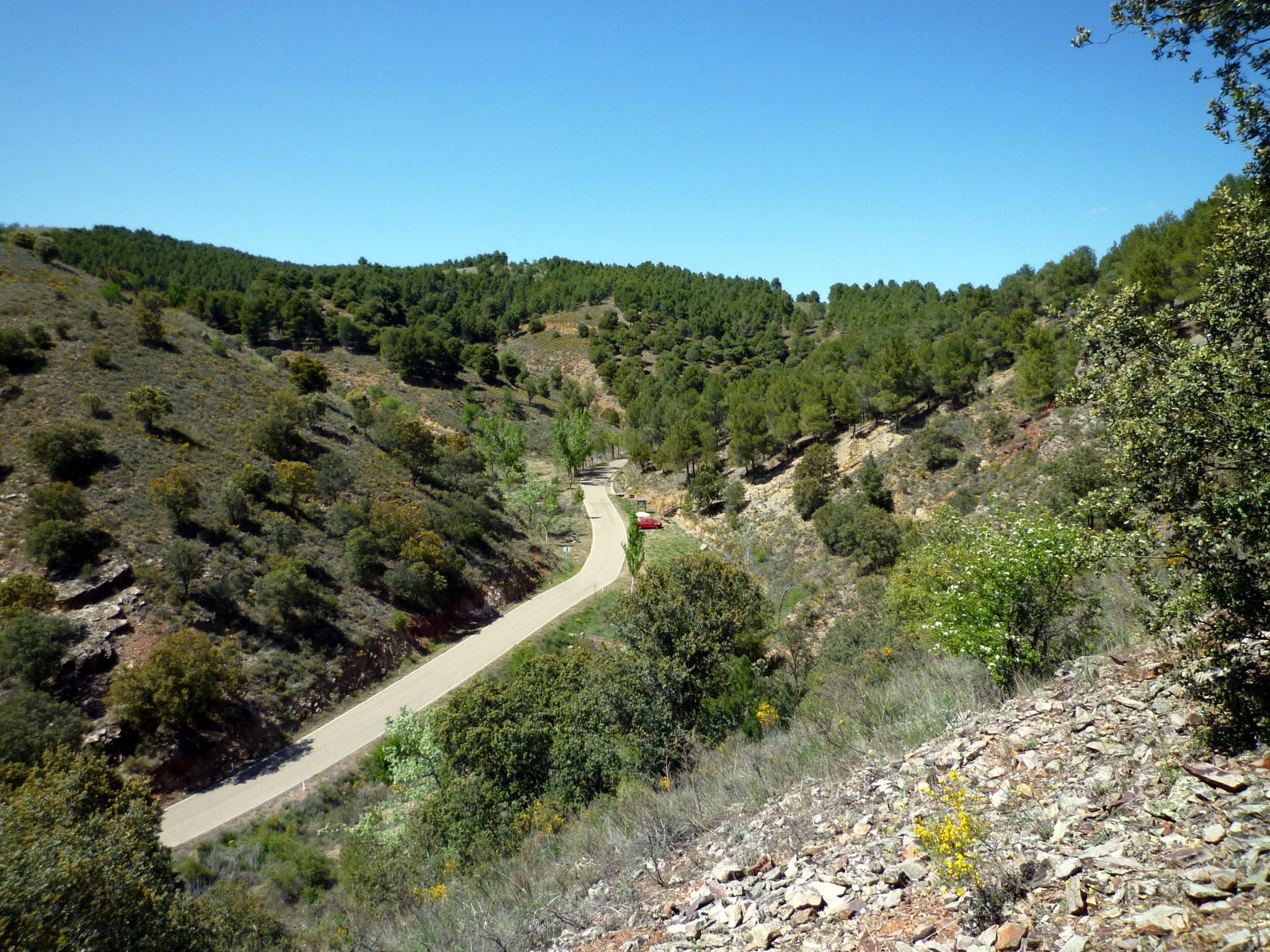 Rambla de Valdemiedes. Sucesiones estratigráficas del Cámbrico Inferior-Medio. Murero (Zaragoza, España) Vista hacia el noreste.